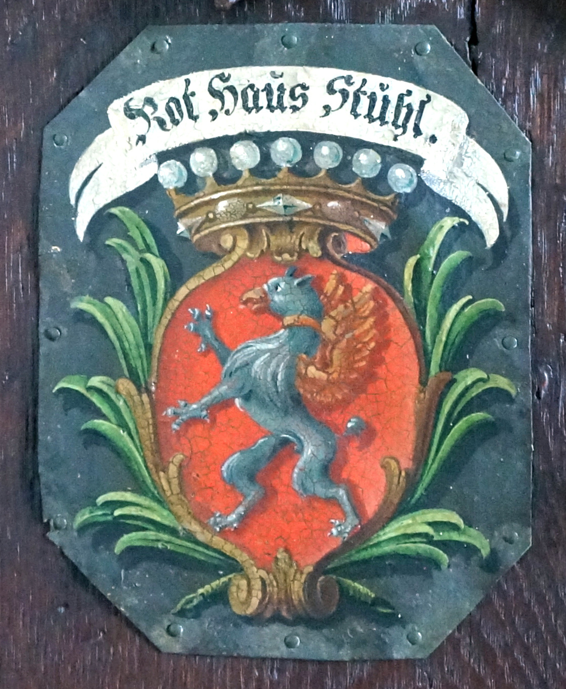 Kirchenortschild Tscharner in der Siechenkappelle, Waldau Bern.